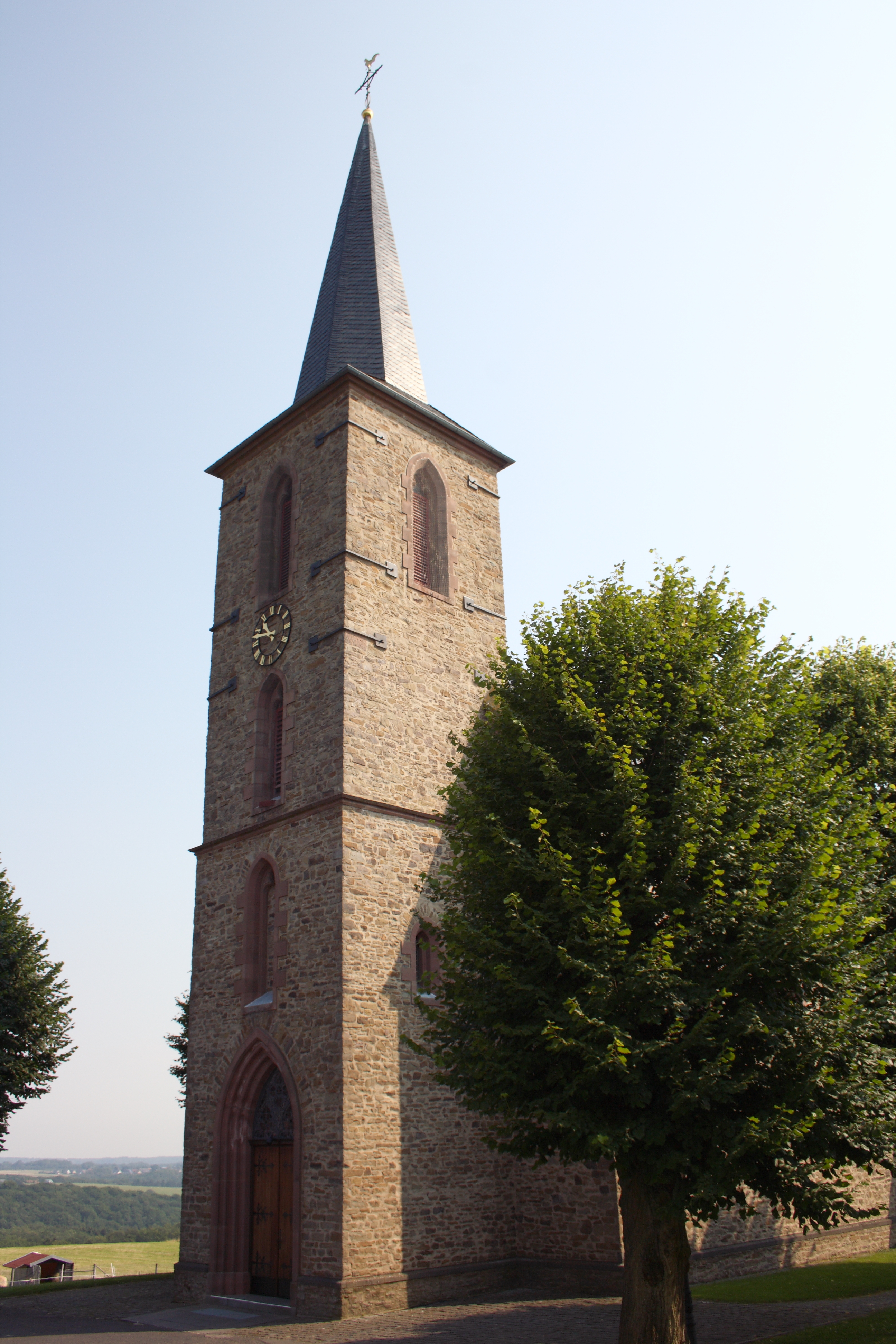 katholische Pfarrkirche St. Stephan in Effelsberg, einem Ortsteil von Bad Münstereifel im Kreis Euskirchen (Nordrhein-Westfalen)